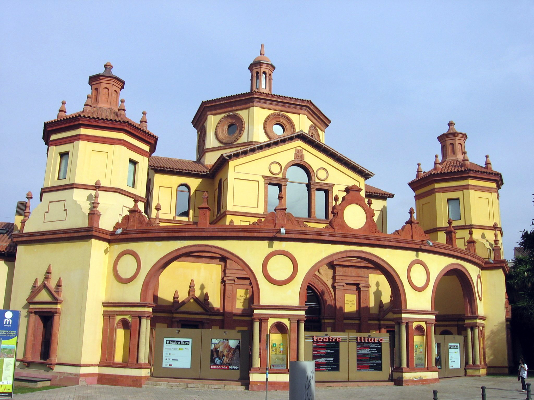 Palacio de Agricultura, actual Ciudad del Teatro, Montjuïc (Barcelona)